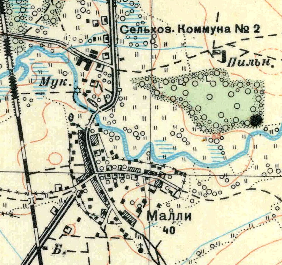 Топографическая карта Ленинградской области, квадрат О-35-22-Г-а (Керстово), деревня Коммунар.